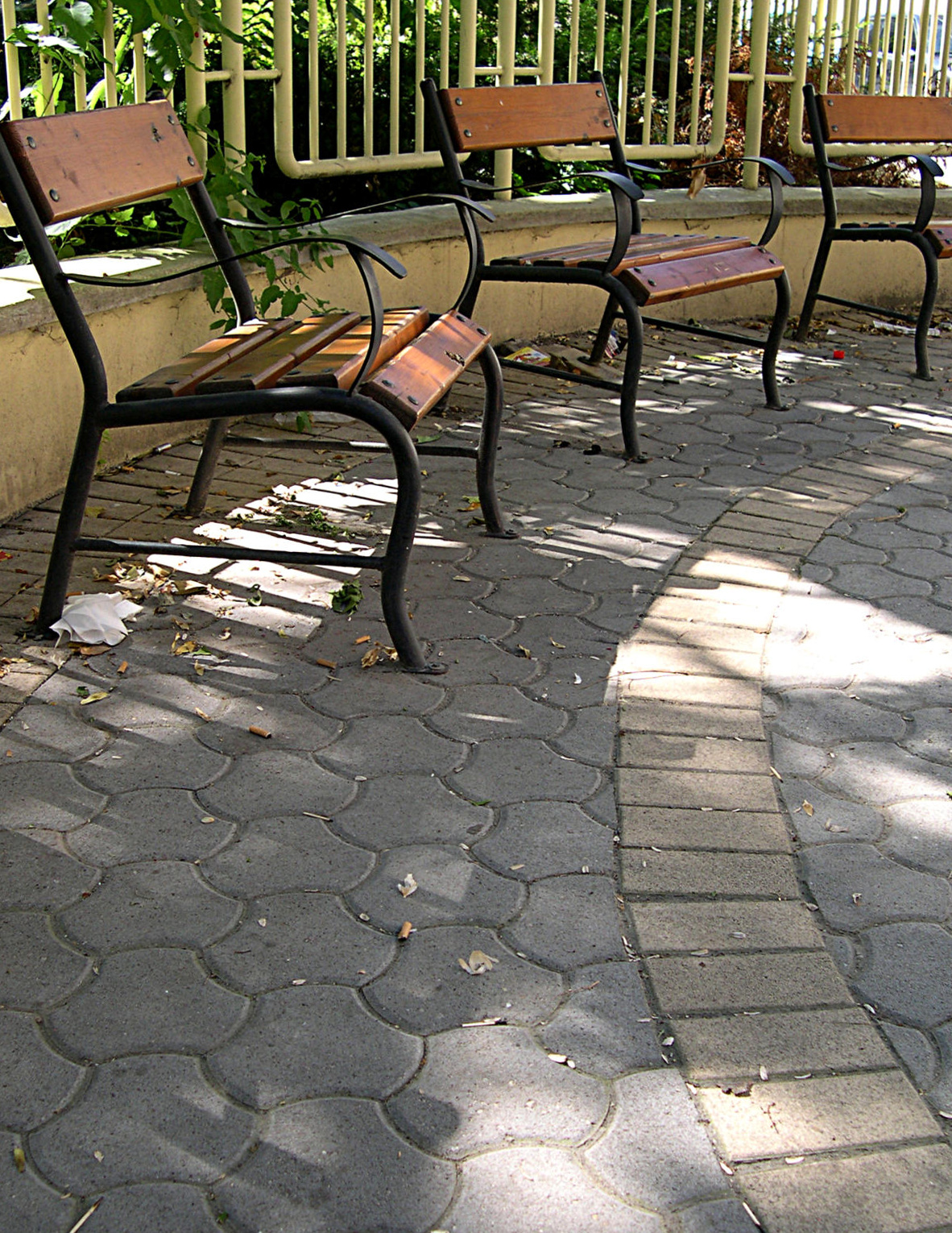 Padok, Bp. VIII. kerület